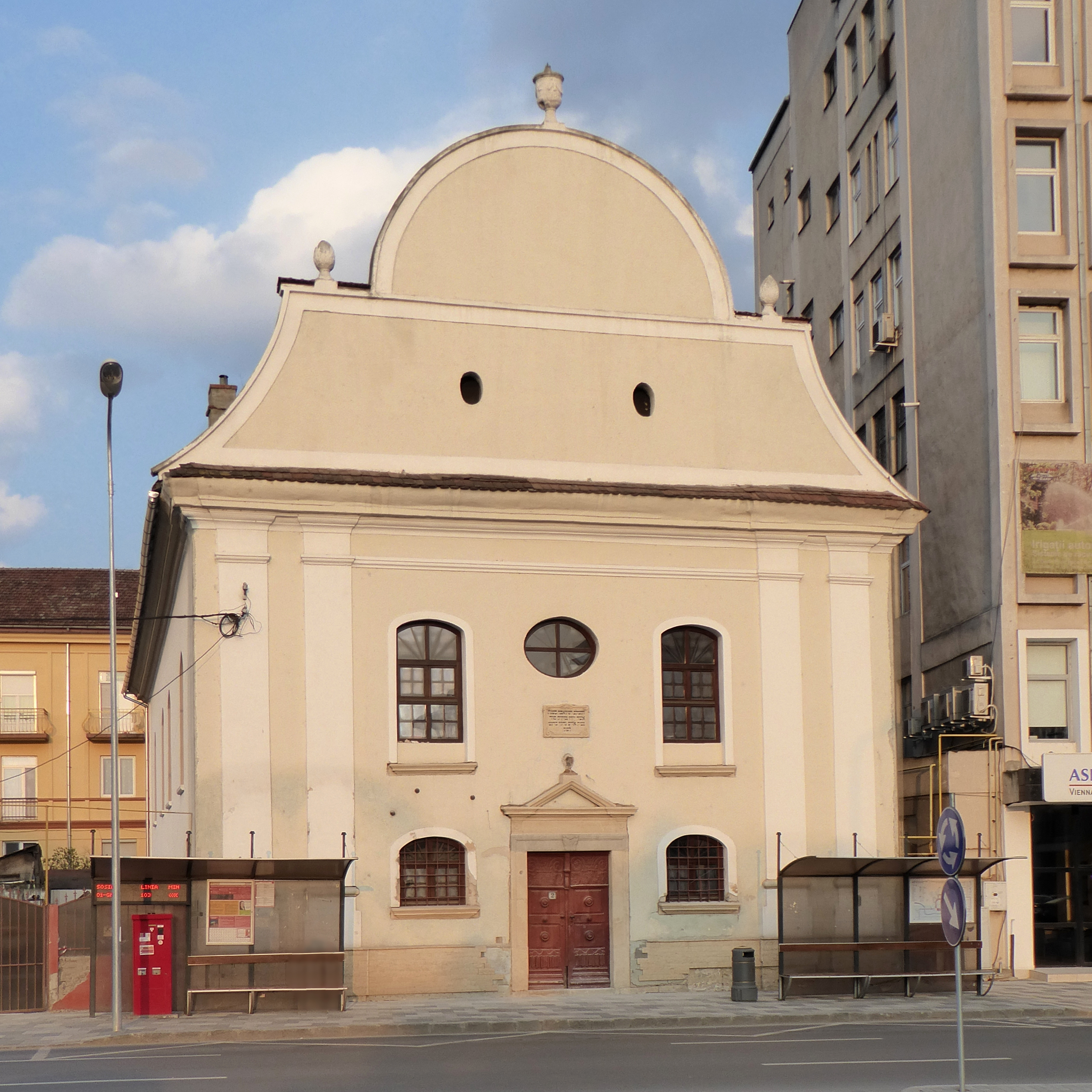 Synagoge in Alba Iulia (Weißenburg/Karlsburg, RO).